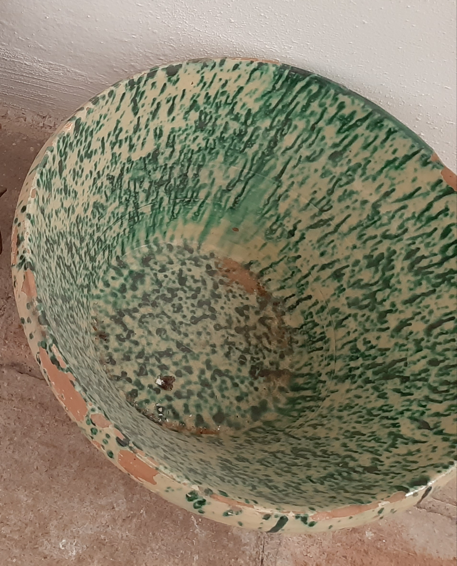 Lemmo, antico contenitore siciliano in terracotta per uso alimentare